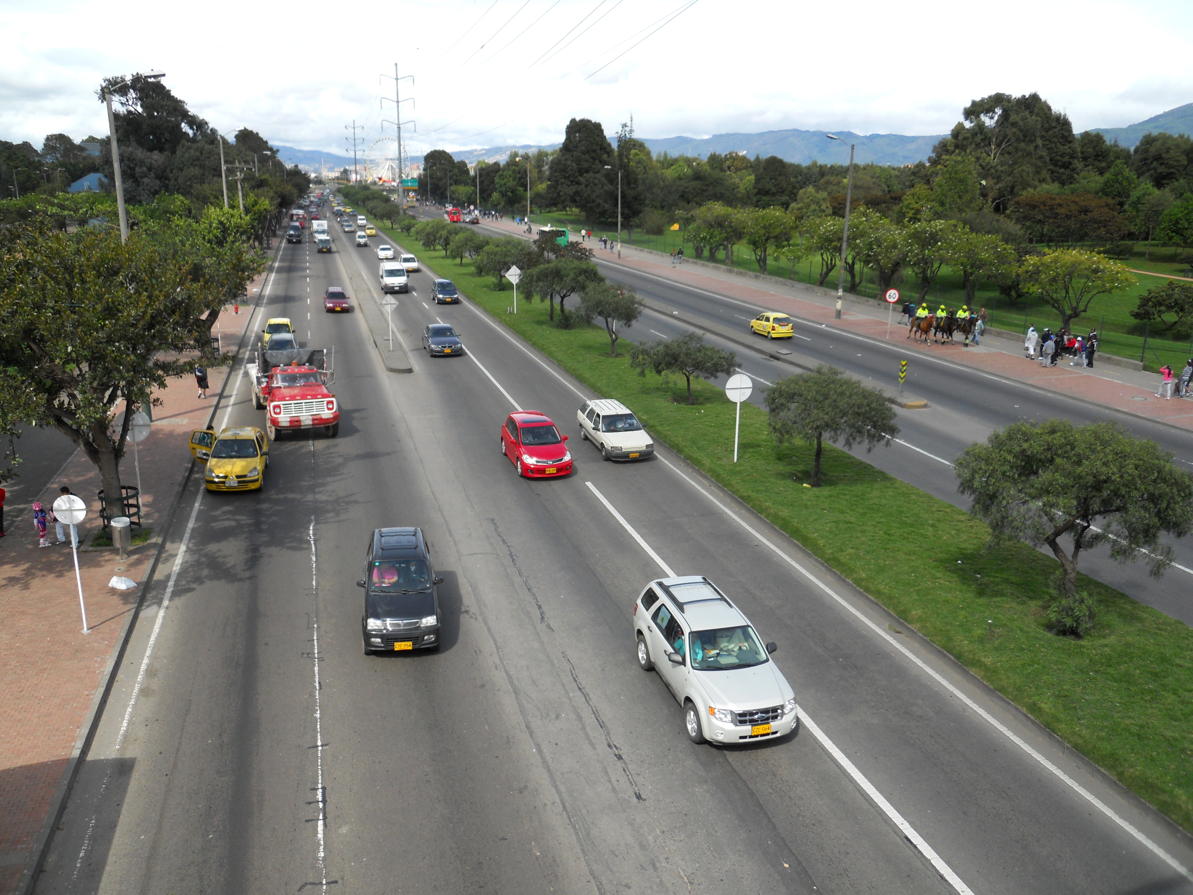 Avenida 68 con calle 49 A, límite entre Fontibón y Engativá.